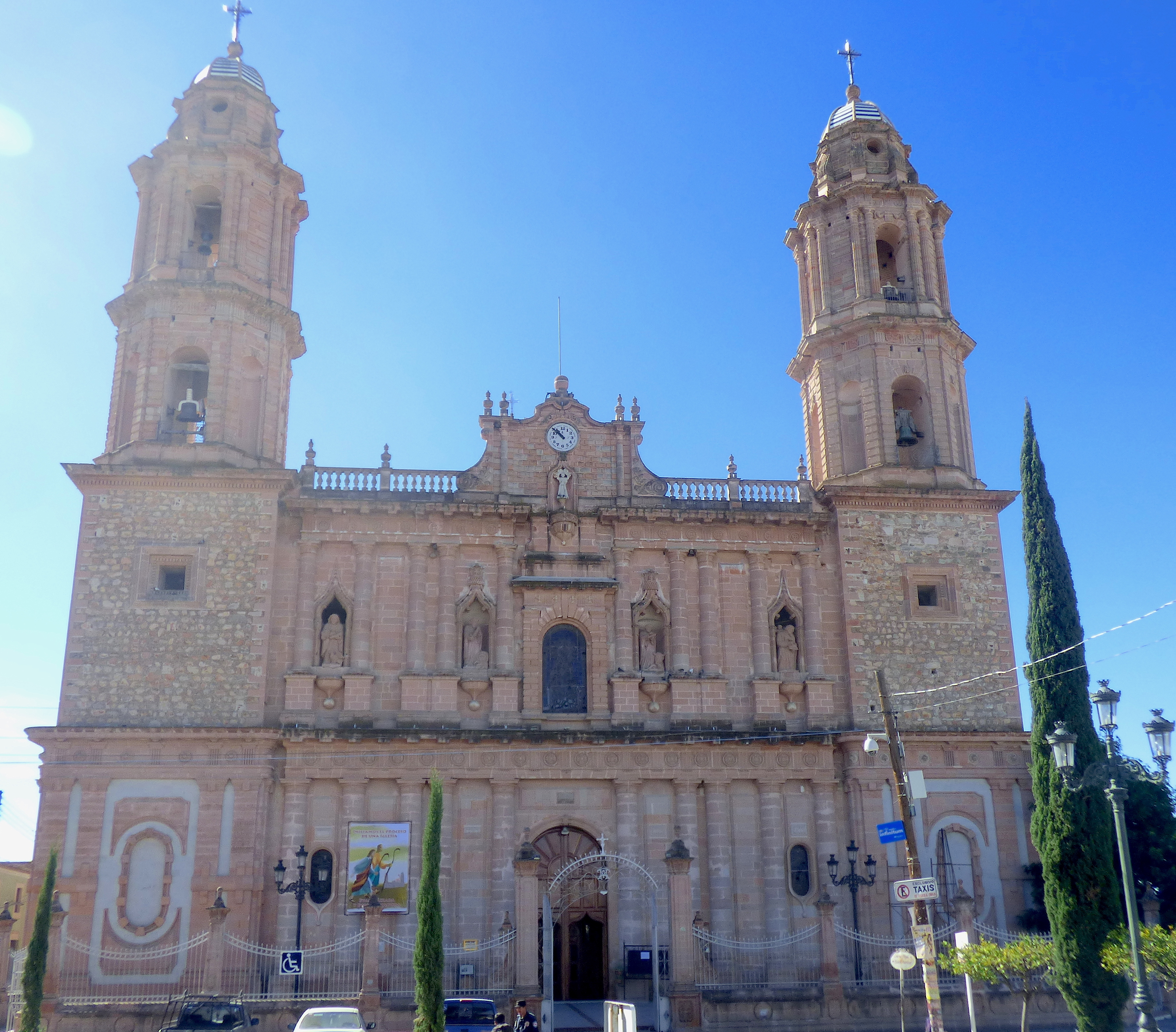 Parroquia de Nuestra Señora de los Dolores, Teocaltiche, Jalisco